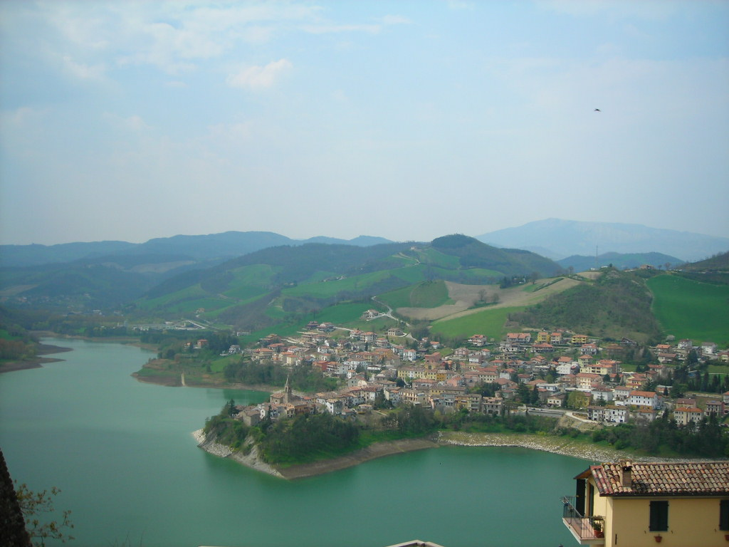 Sassocorvaro - Veduta della frazione di Mercatale